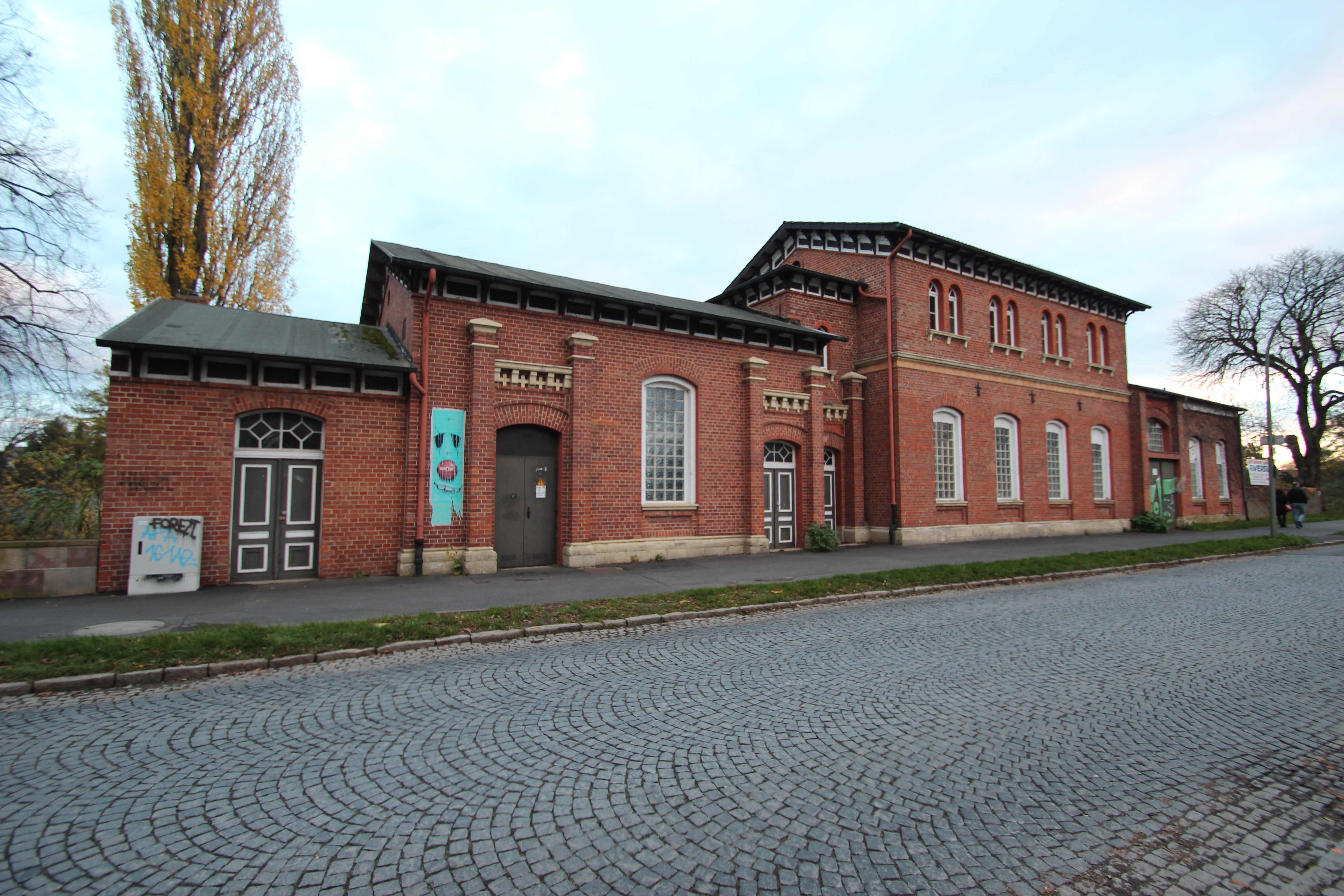 Pumpstation für die Lokomotiven im Hauptbahnhof Auedamm 13 in Kassel